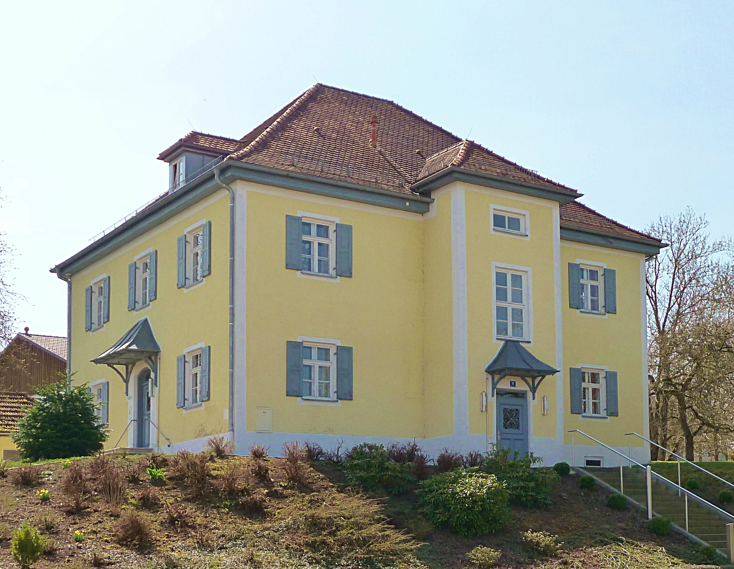 Das denkmalgeschützte Pfarrhaus von Reicheneibach